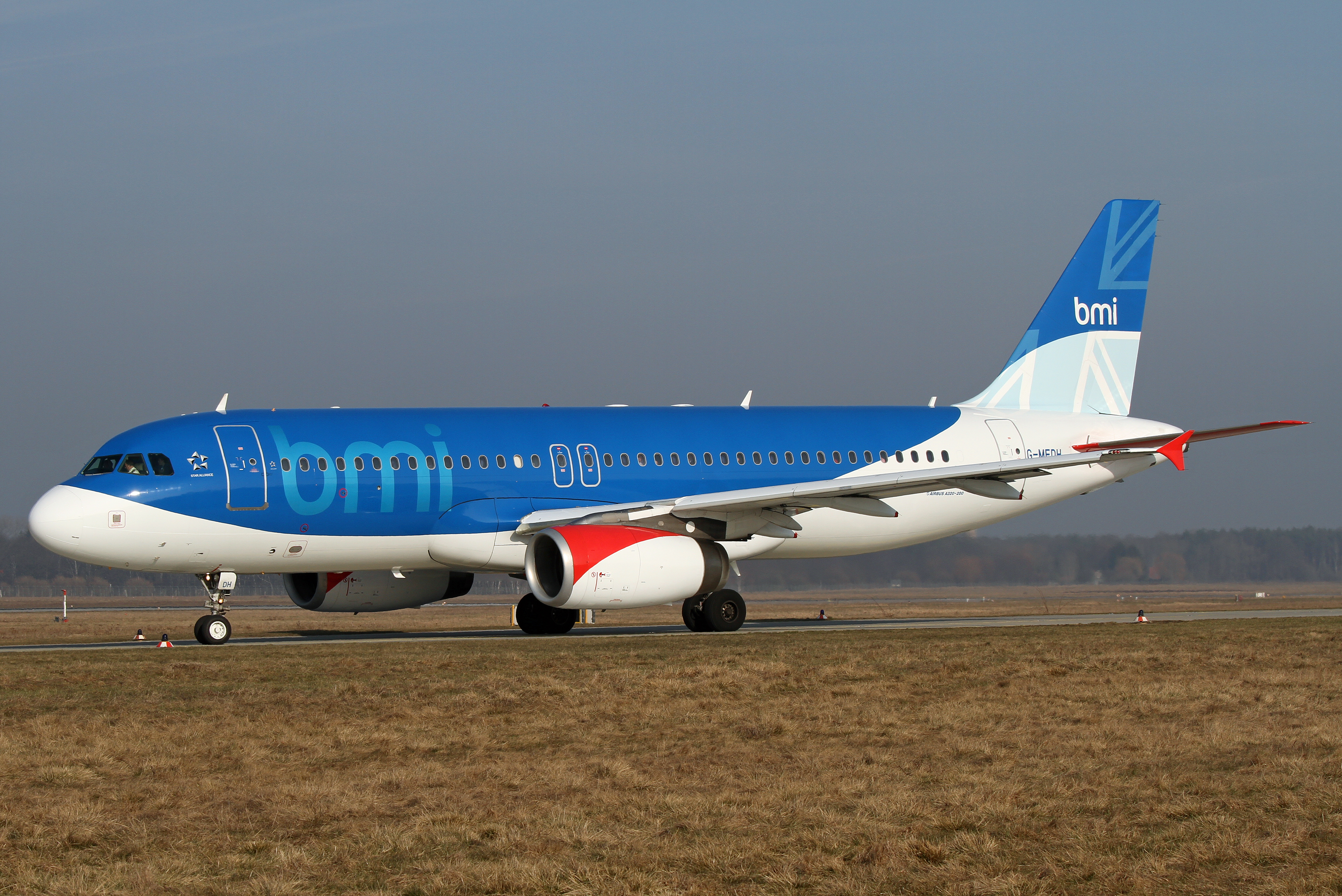 Airbus A320 Bmi G-MEDH